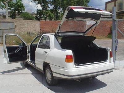 Foto realizada con telefono movil